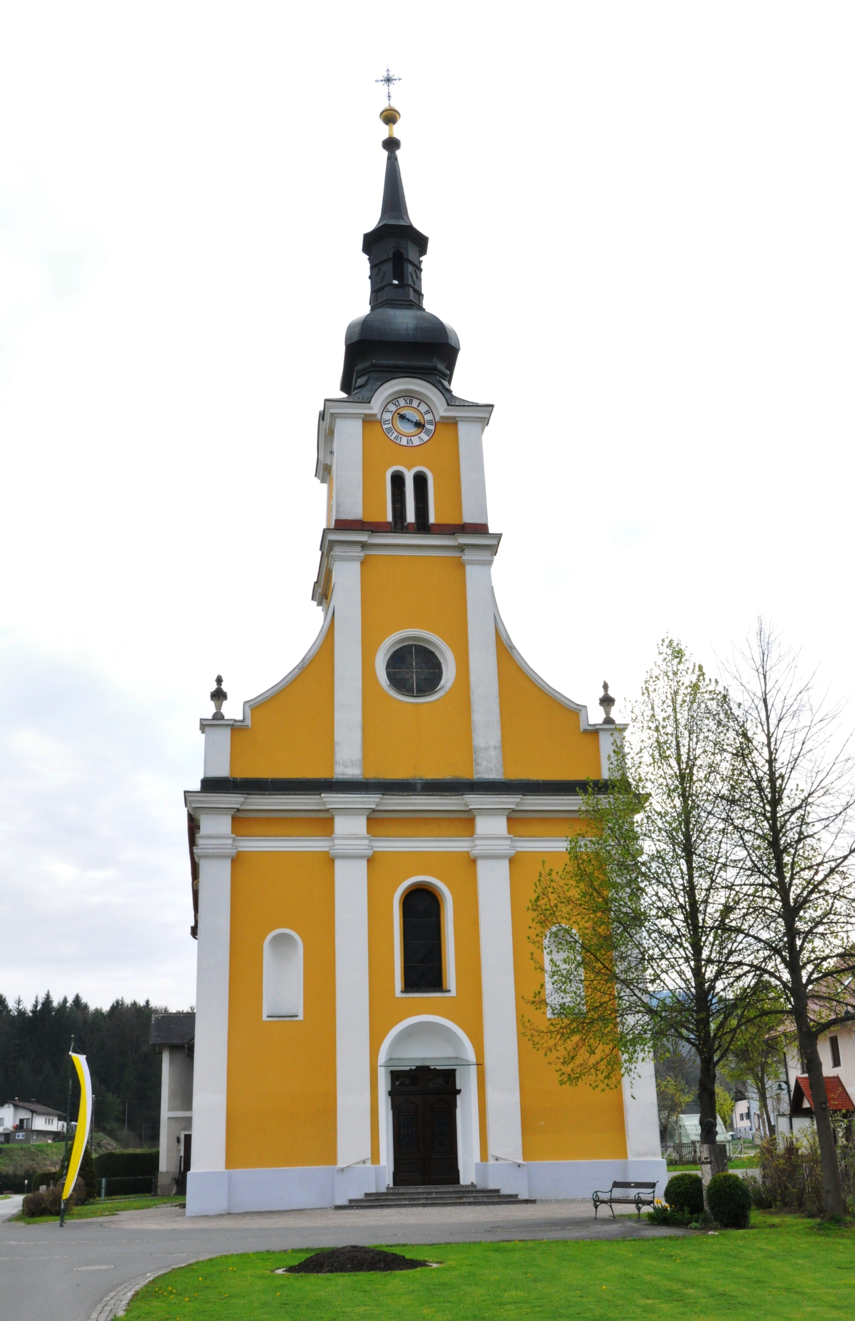 Ehem. Franz-Josef-Jubiläumsschule